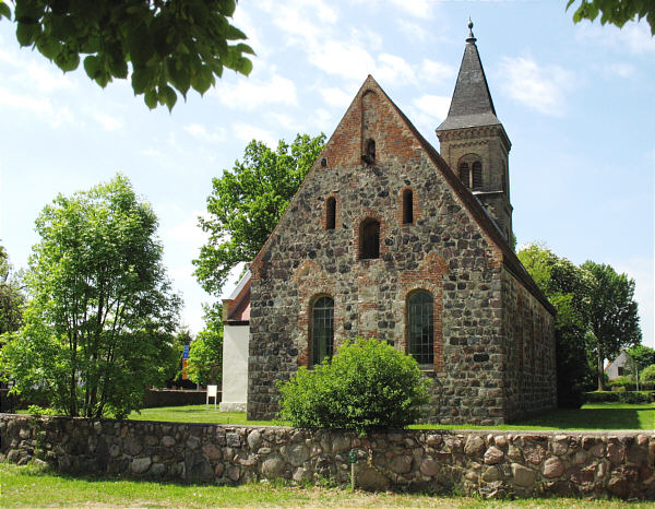 Dorfkirche Schoenfliess Oberhavel